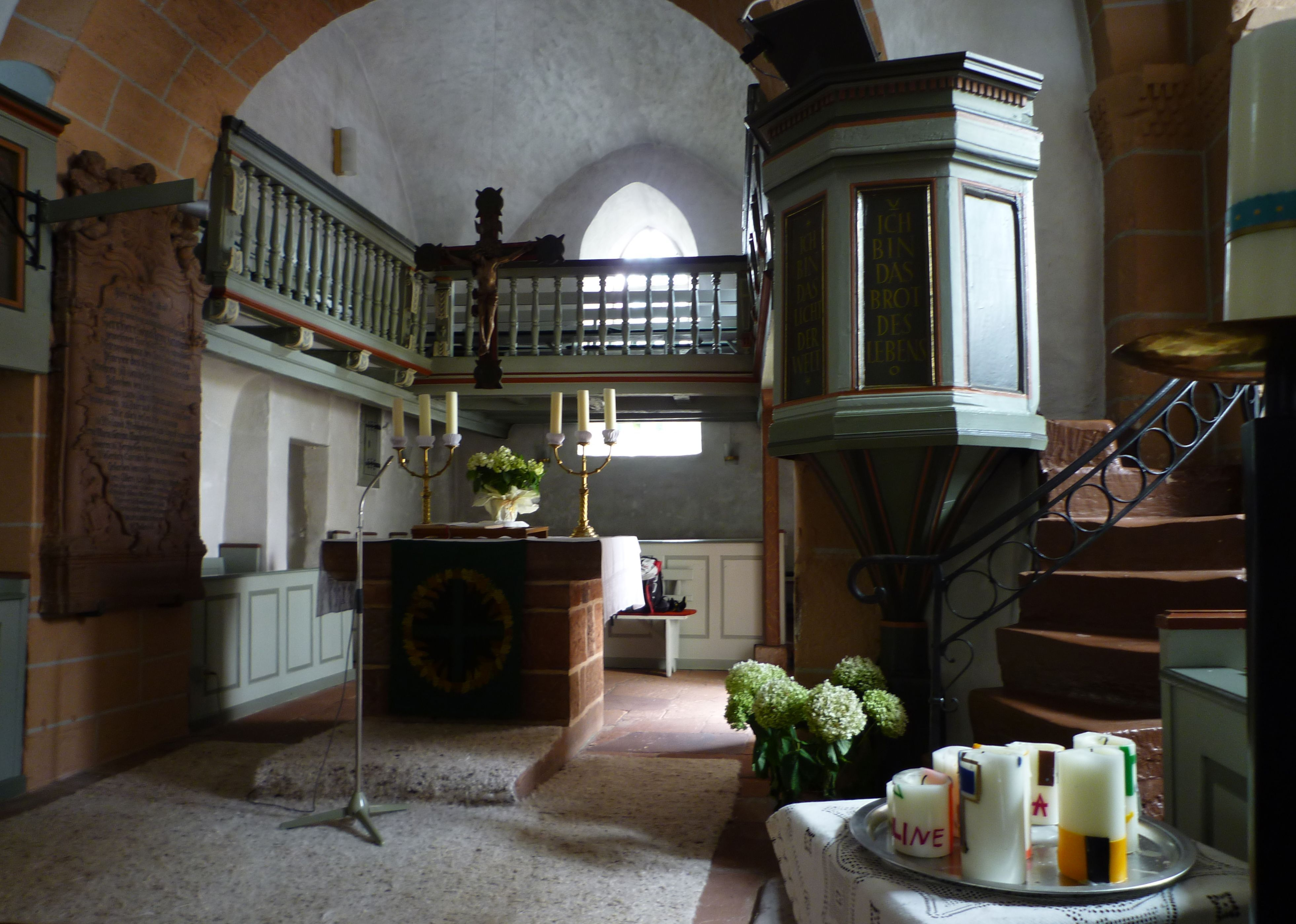 Battenfeld - Kirche, Chor